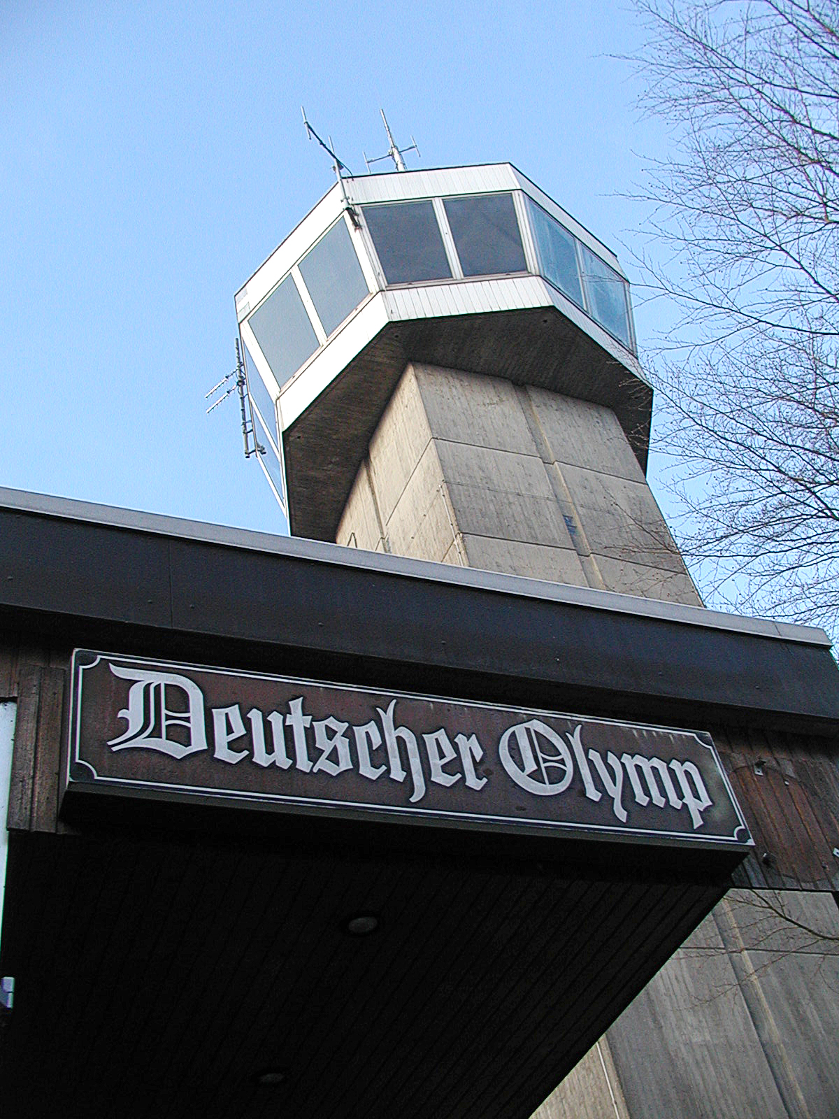 Der Wingster Olymp in Winter